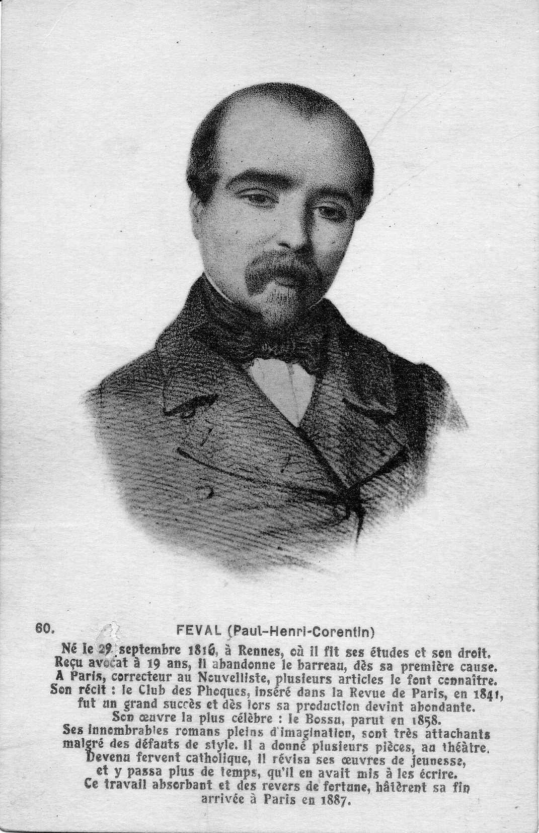 Paul Féval (1816-1887), écrivain. Carte postale François Château, conservée aux Archives de Rennes, 100 Fi 430